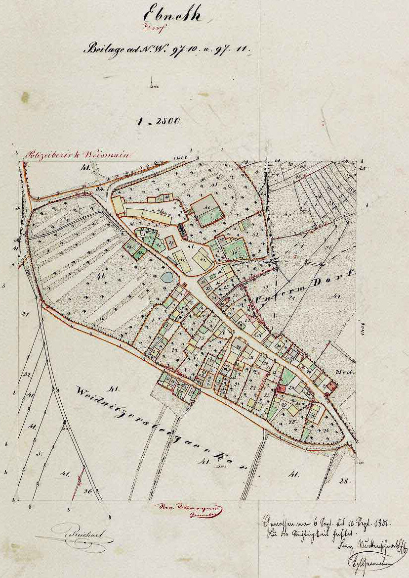 Ortsplan von Ebneth, M 1:2500